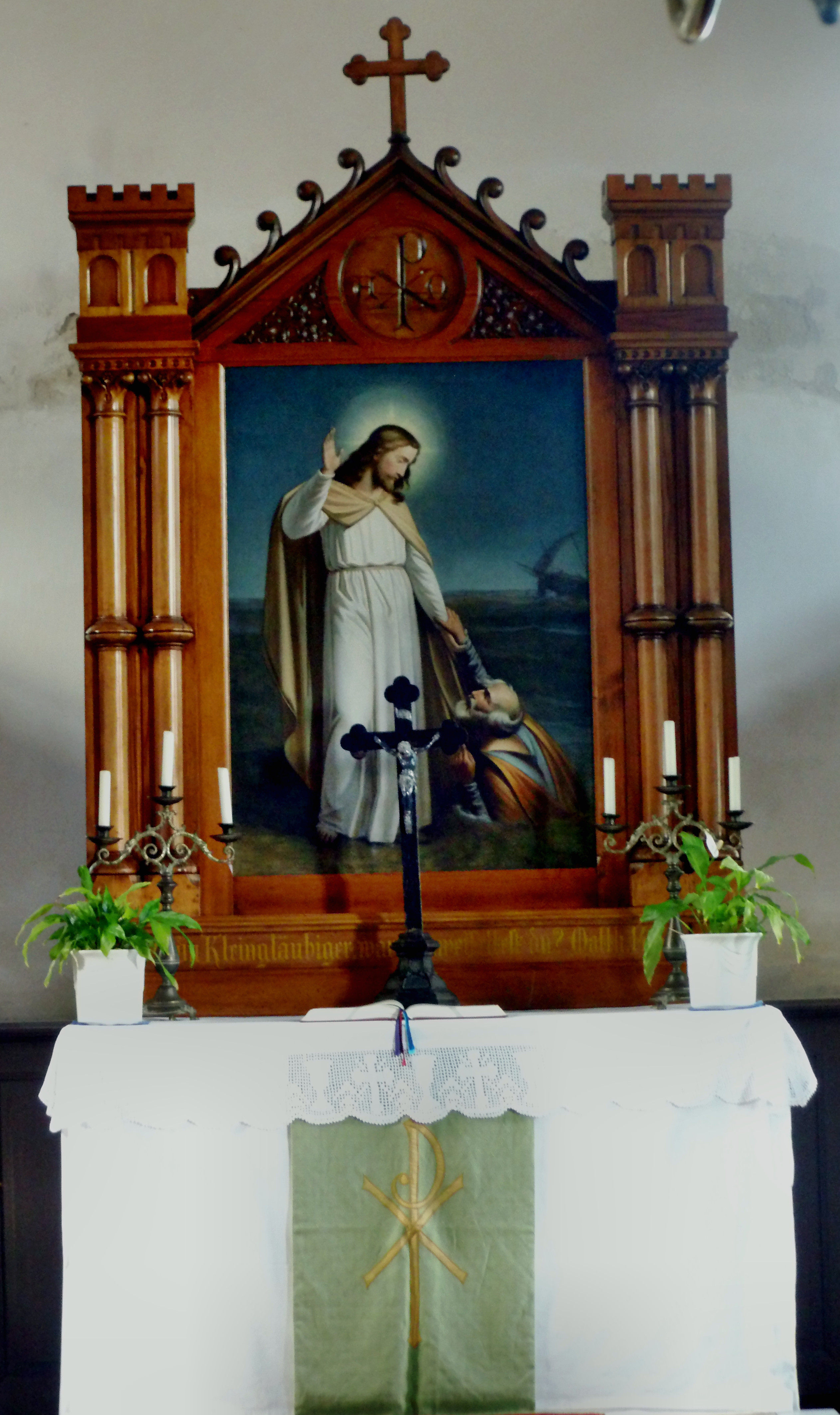 Altar der Evangelisch-lutherischen Kirche in Berdum (Stadt Wittmund, Ostfriesland, Niedersachsen, Deutschland)